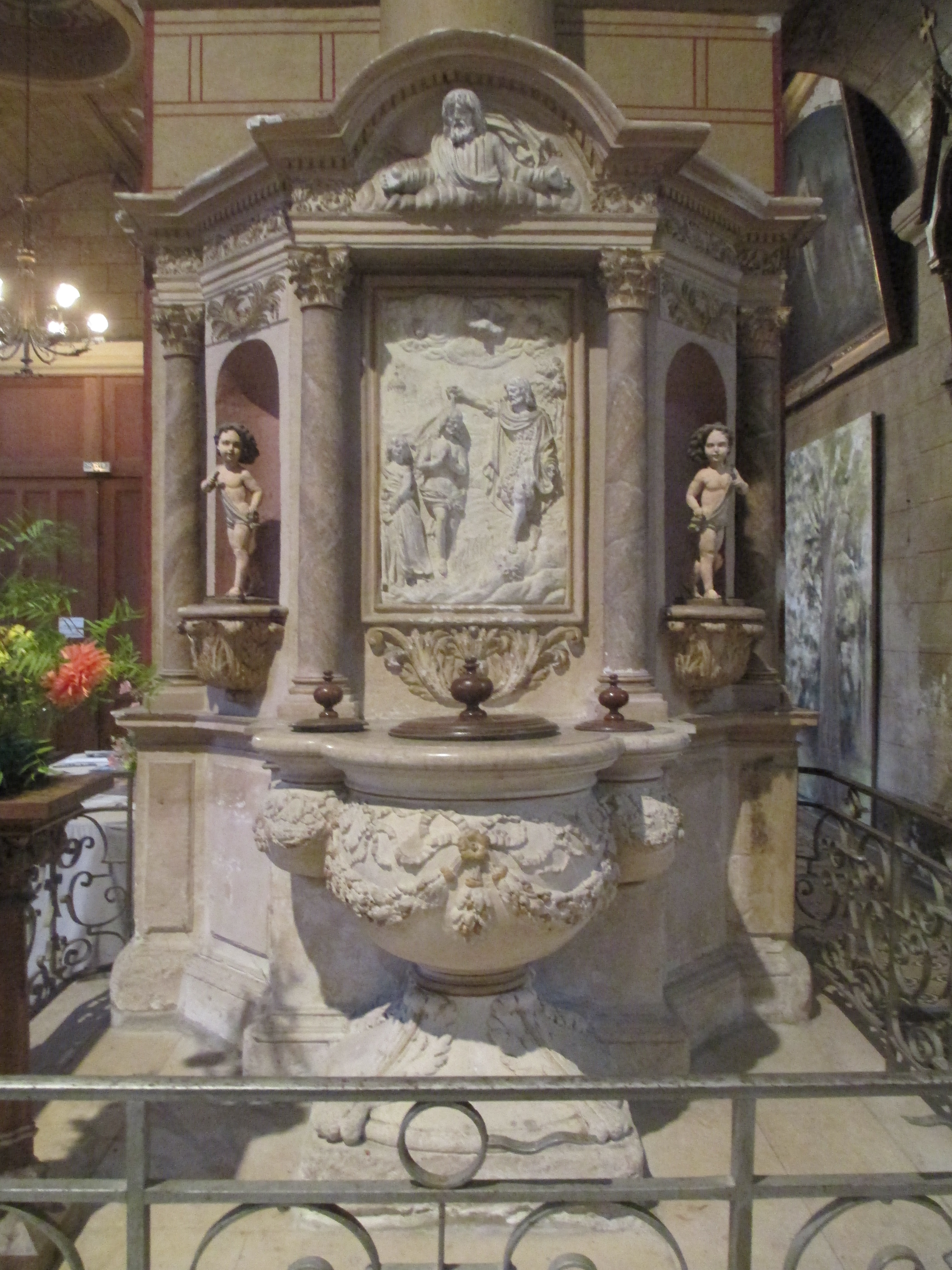 Fonds baptismaux de l'église Saint-Sauveur de Bellême dans l'Orne, classés aux monuments historiques.